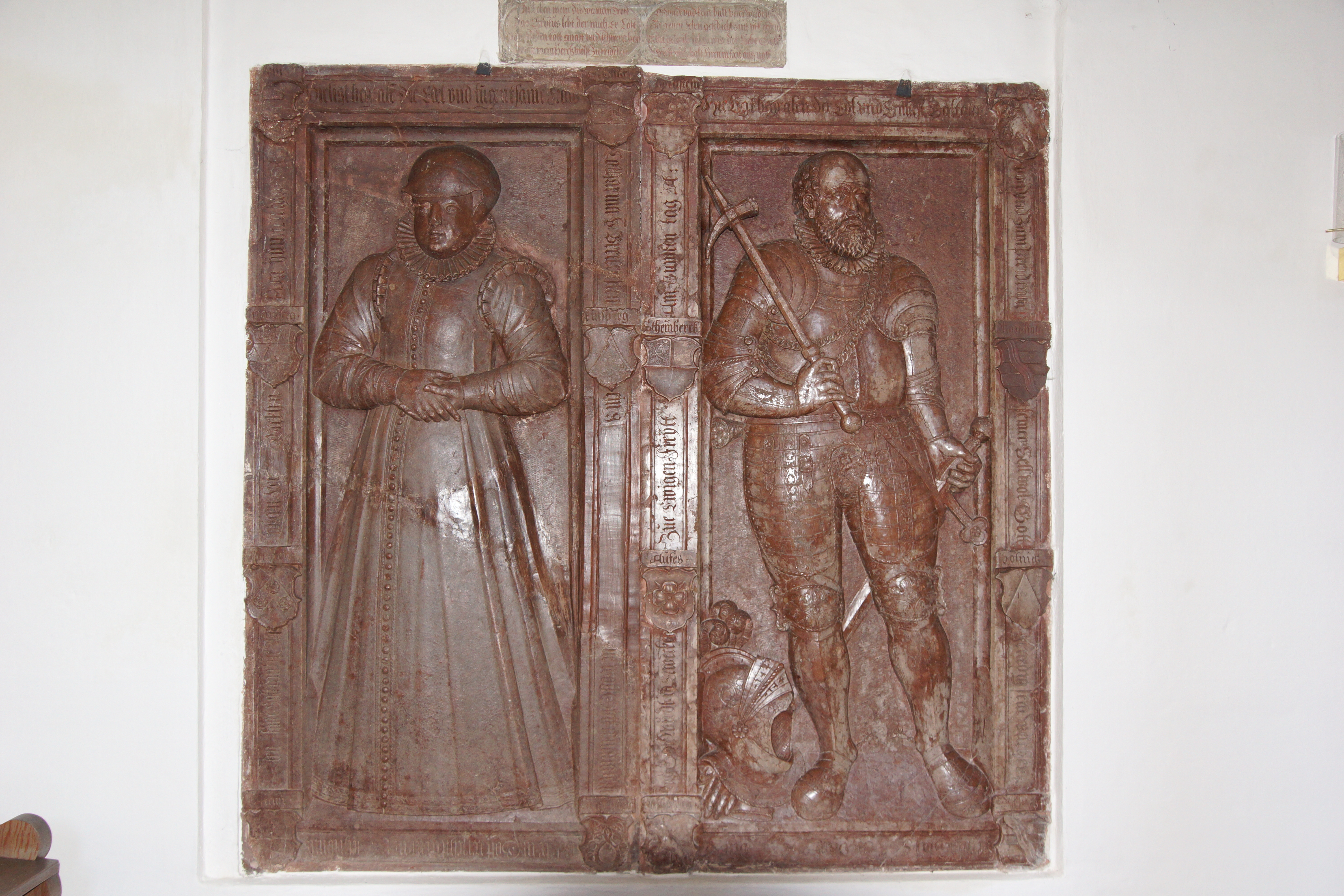 Die evangelische Pfarrkirche St. Georg in Königstein / Oberpfalz